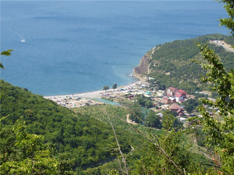 Вид на поселок Дюрсо